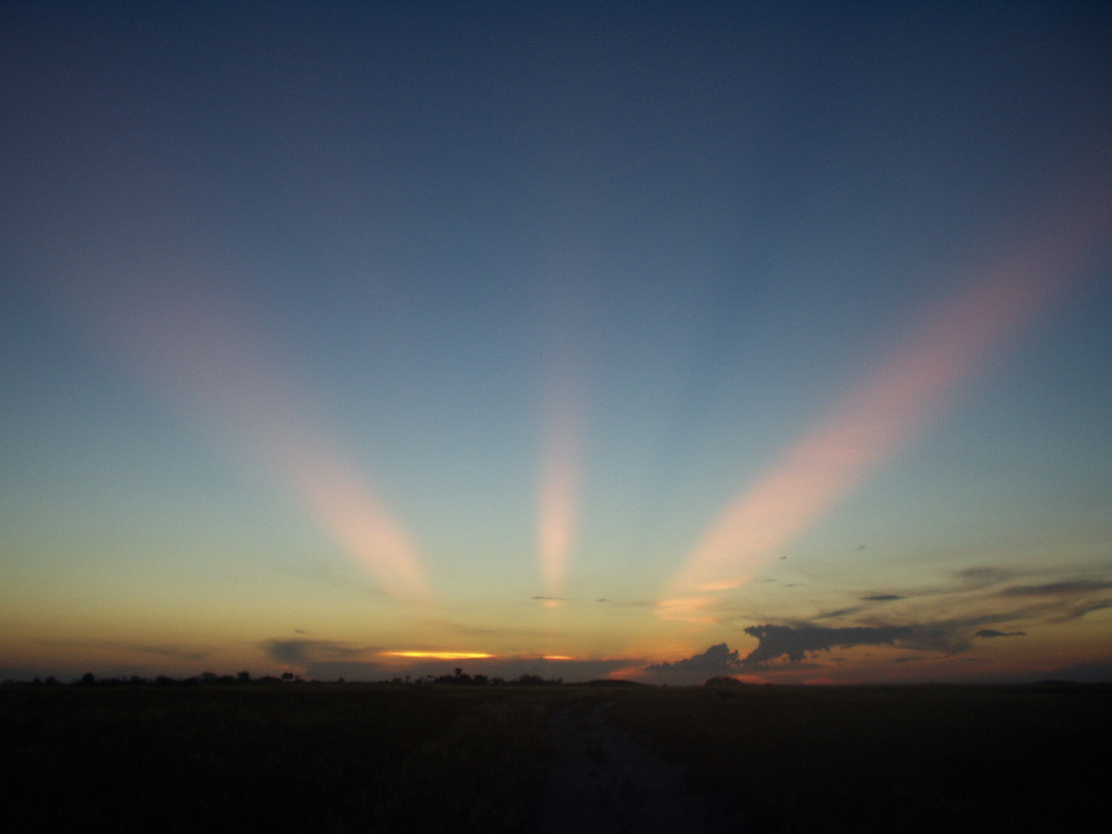 Pôr do Sol no Tepequém